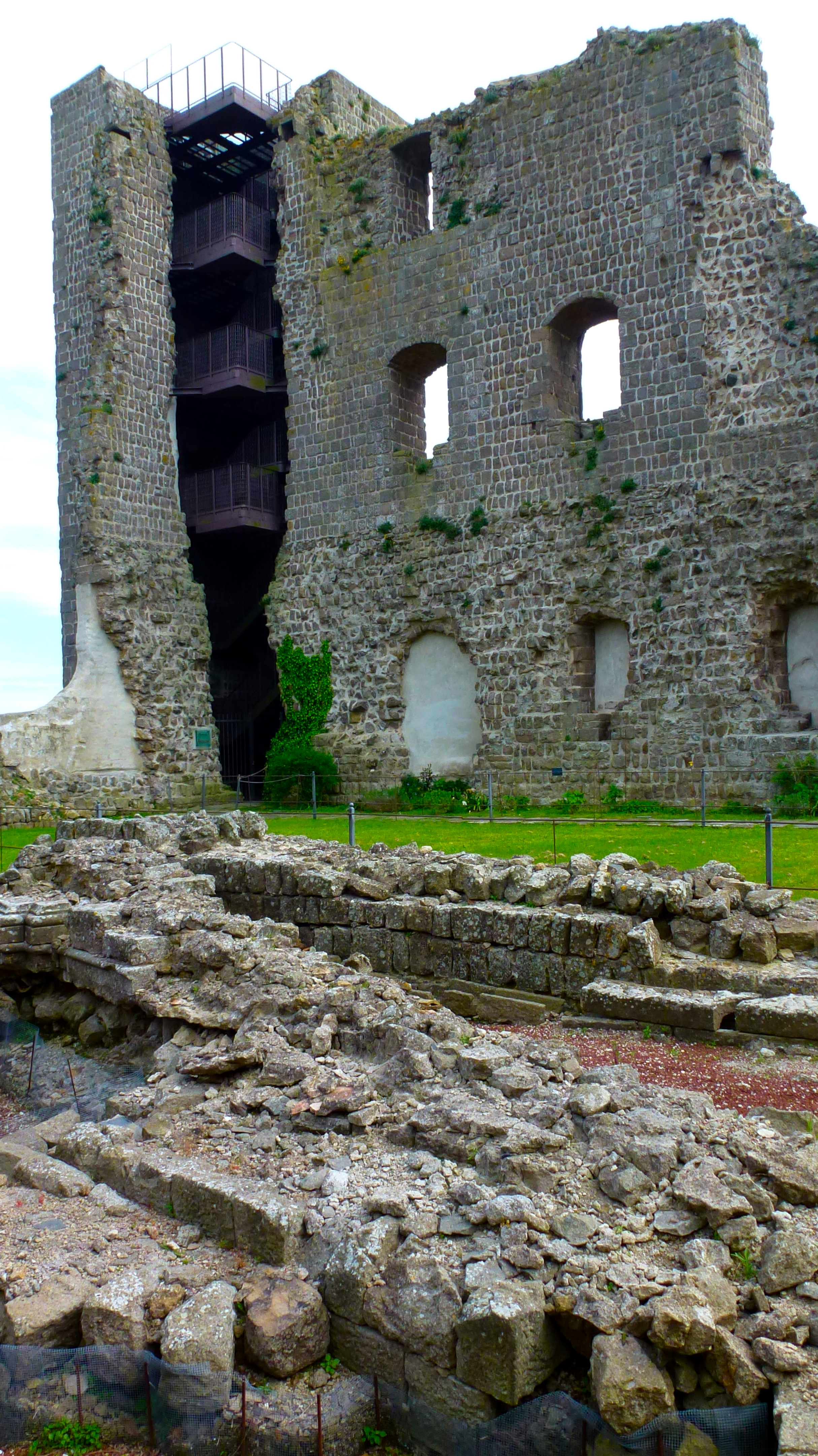 Torre del pellegrino, Rocca dei Papi (Montefiascone)